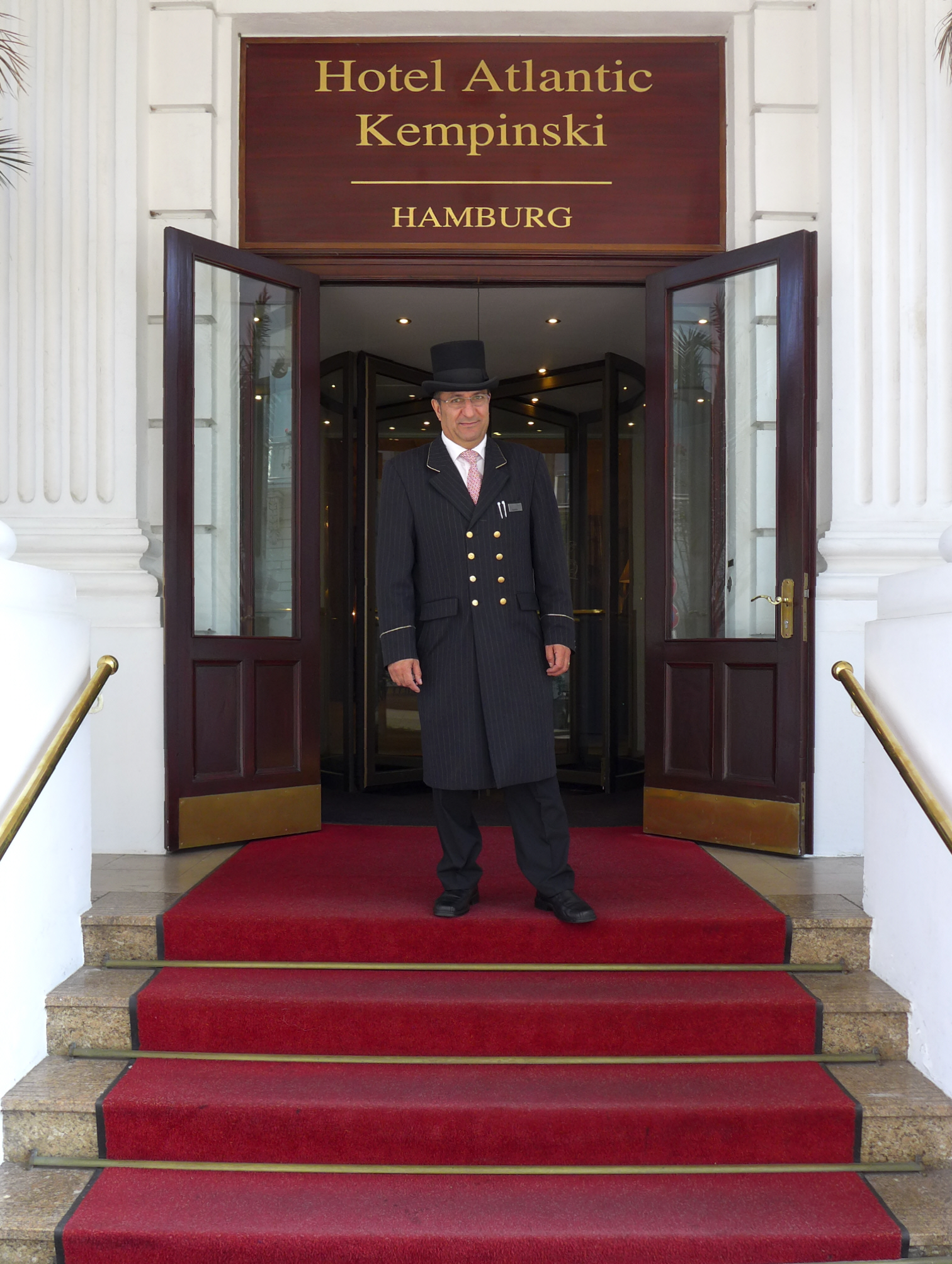 Freundlicher und hilfsbereiter Doorman des Hotel Atlantic Kempinski Hamburg.